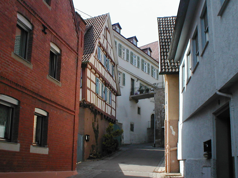 Historisches Gebäudeensemble in der Kirchbergstraße in Lauffen am Neckar